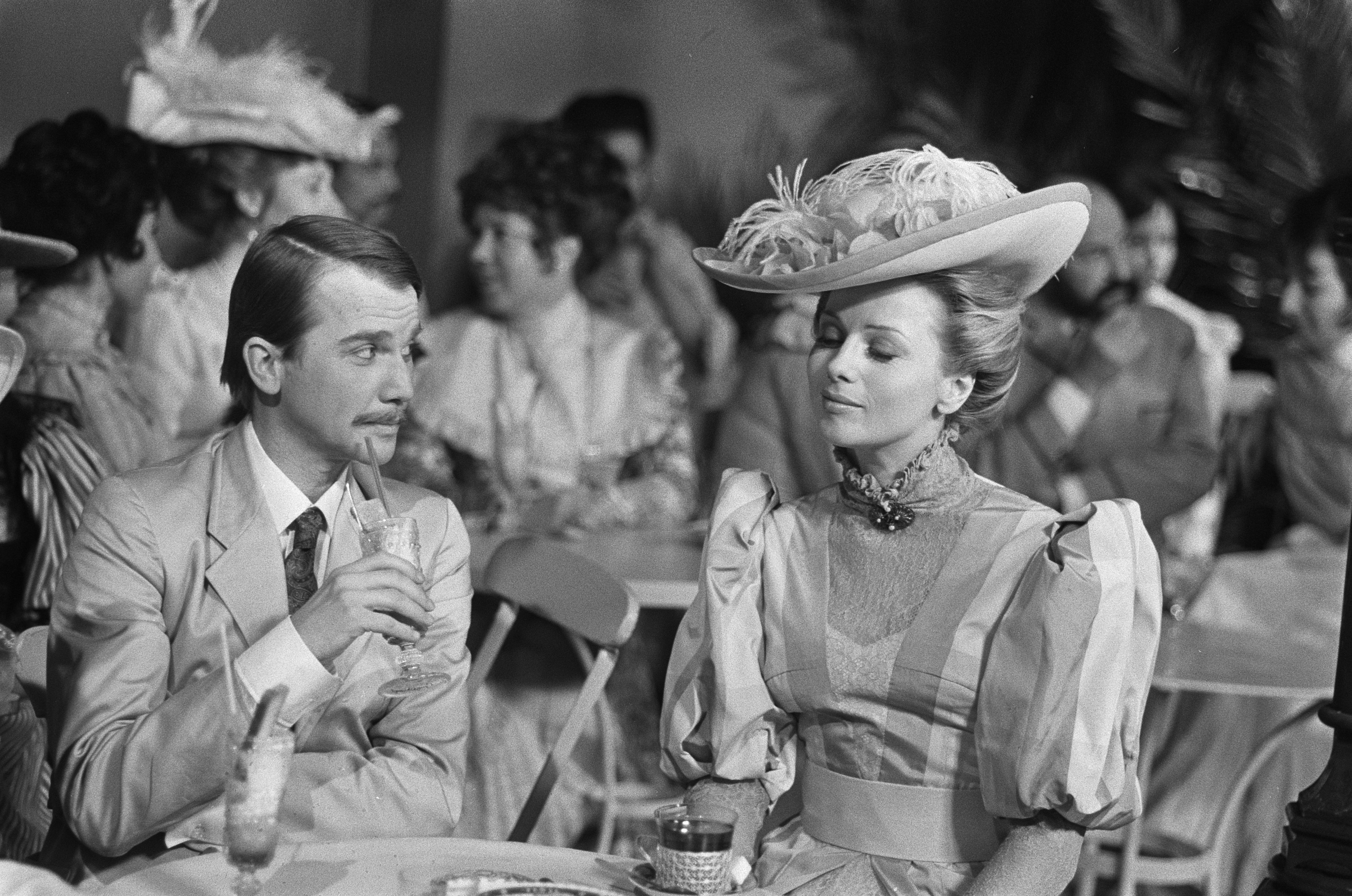 Collectie / Archief : Fotocollectie Anefo Reportage / Serie : [ onbekend ] Beschrijving : TV-spel De Stille Kracht (AVRO), Pleuni Touw en Willem Nijholt Datum : 4 januari 1973 Trefwoorden : TV-spellen Persoonsnaam : Nijholt, Willem, Touw, Pleuni Fotograaf : Punt, […] / Anefo Auteursrechthebbende : Nationaal Archief Materiaalsoort : Negatief (zwart/wit) Nummer archiefinventaris : bekijk toegang 2.24.01.05 Bestanddeelnummer : 926-1363